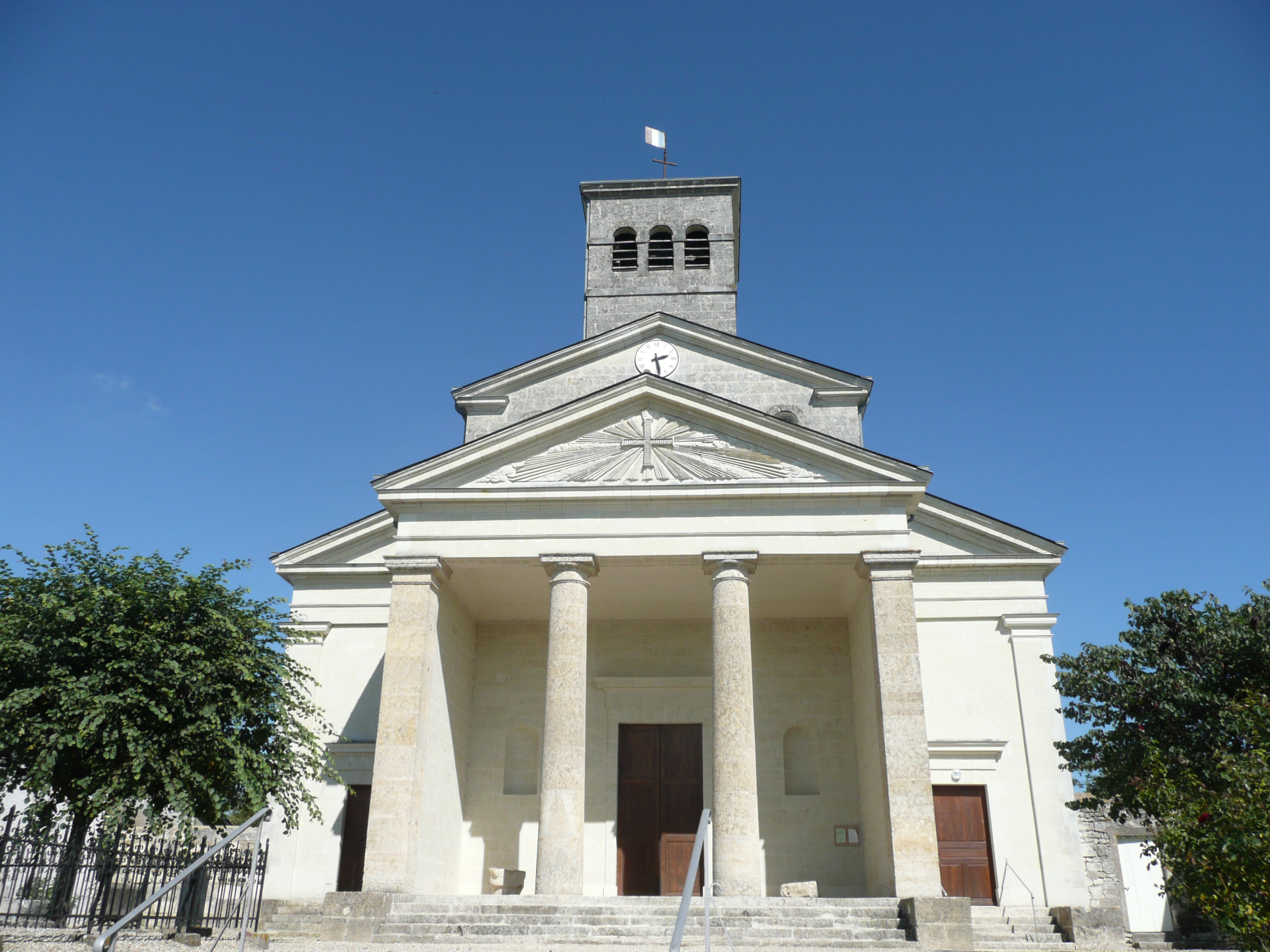 Église Saint-Pierre de Vaudelnay .